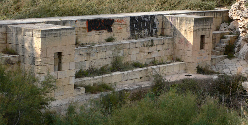 Presa del embalse de Elda en la actualidad. Detalle de las torres para las compuertas.